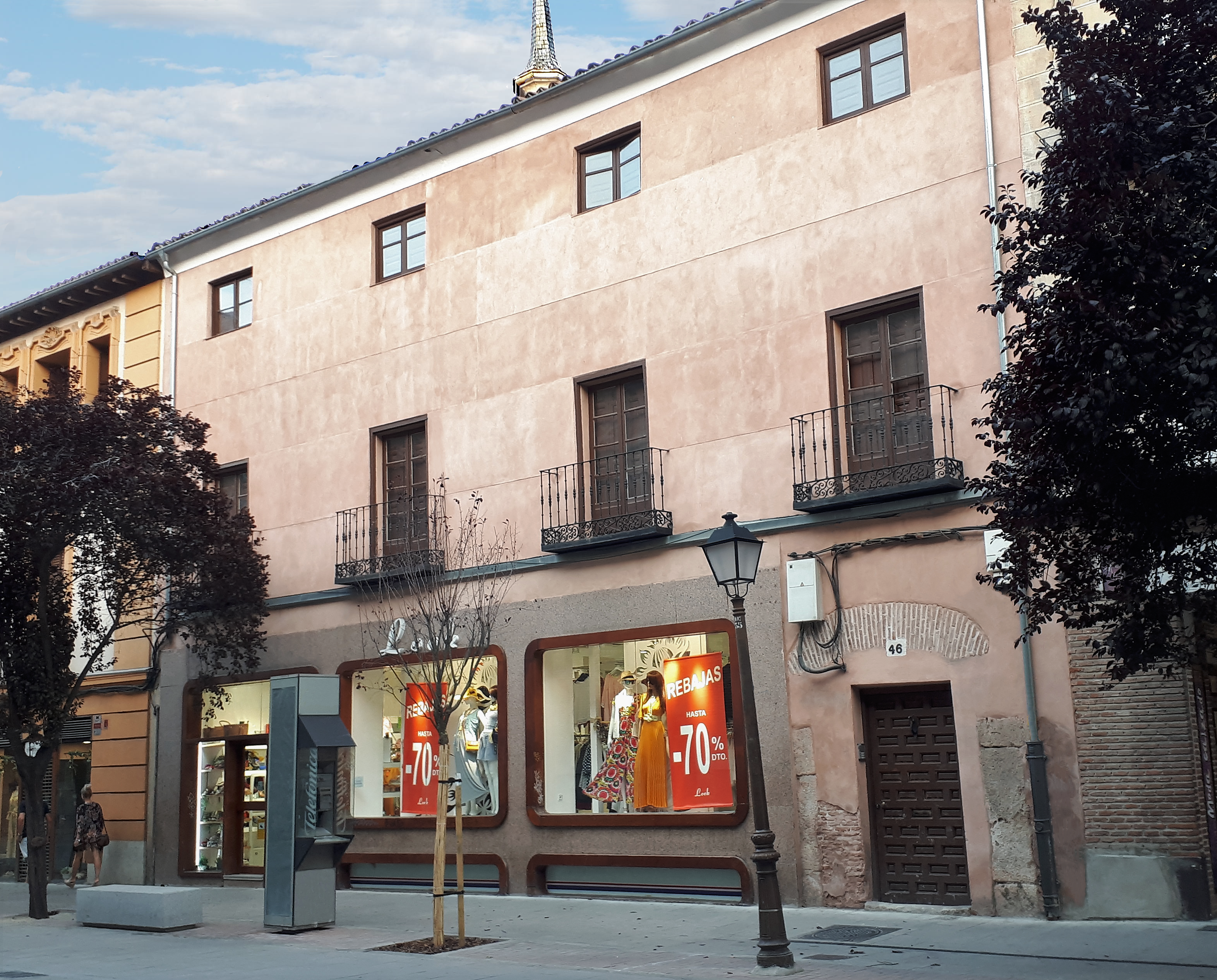 Fachada del Colegio Menor de San Cosme y San Damián o "de Mena" de la Universidad de Alcalá. Fundado por Fernando de Mena en 1568, en la calle Libreros nº 46 de Alcalá de Henares (Comunidad de Madrid - España).